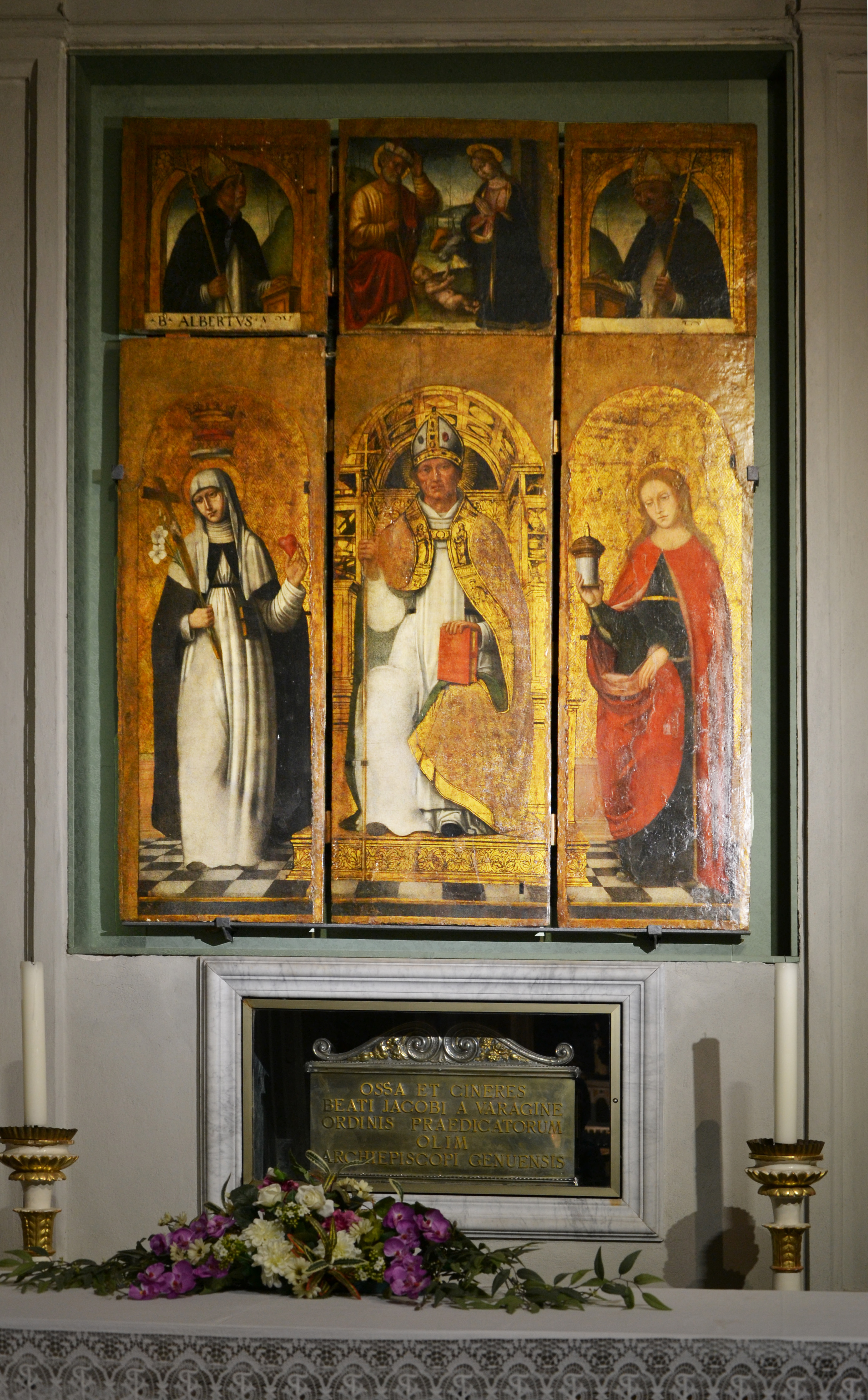 Ossa e ceneri del beato Jacopo da Varagine, Chiesa di San Domenico (Varazze)